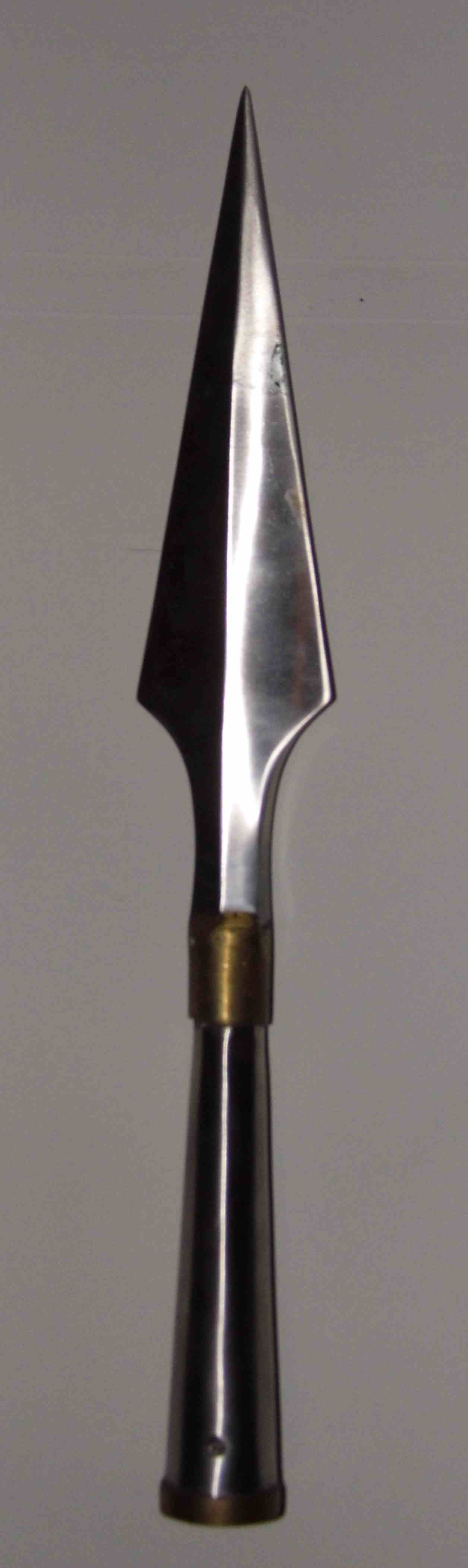 punta di lancia cinese